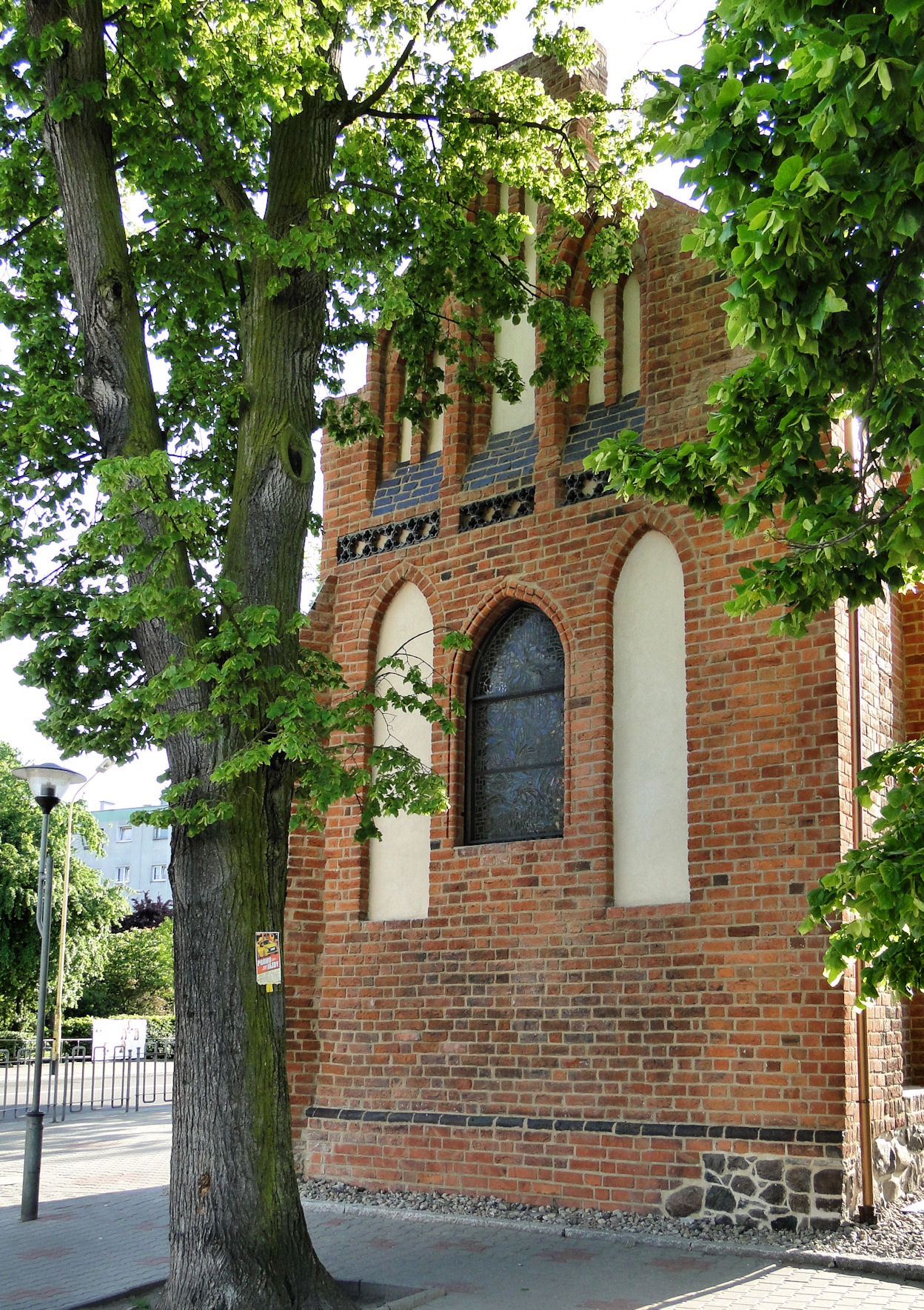 Kaplica gotycka w Policach - elewacja szczytowa wschodnia